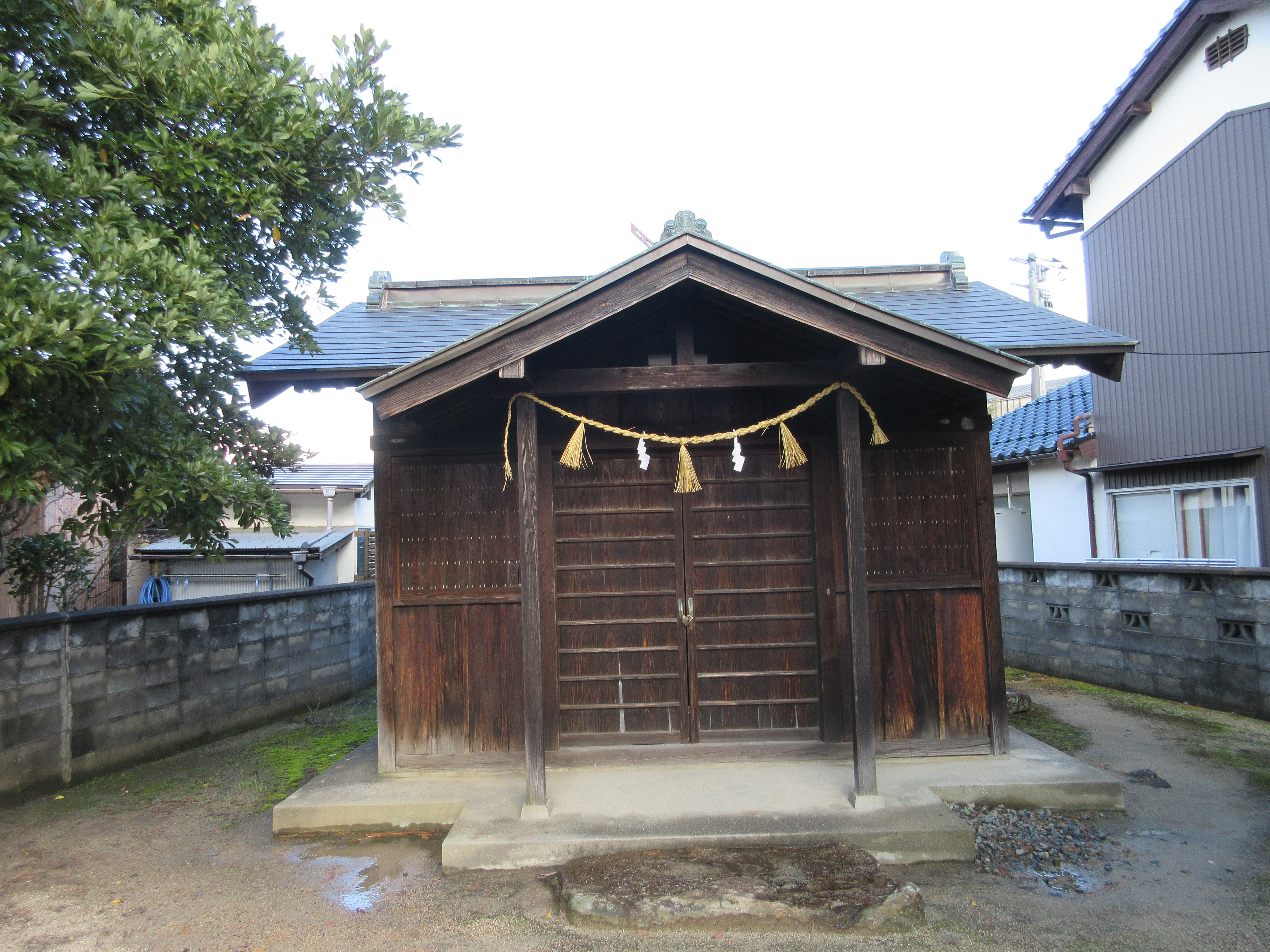 2006.02/19撮影